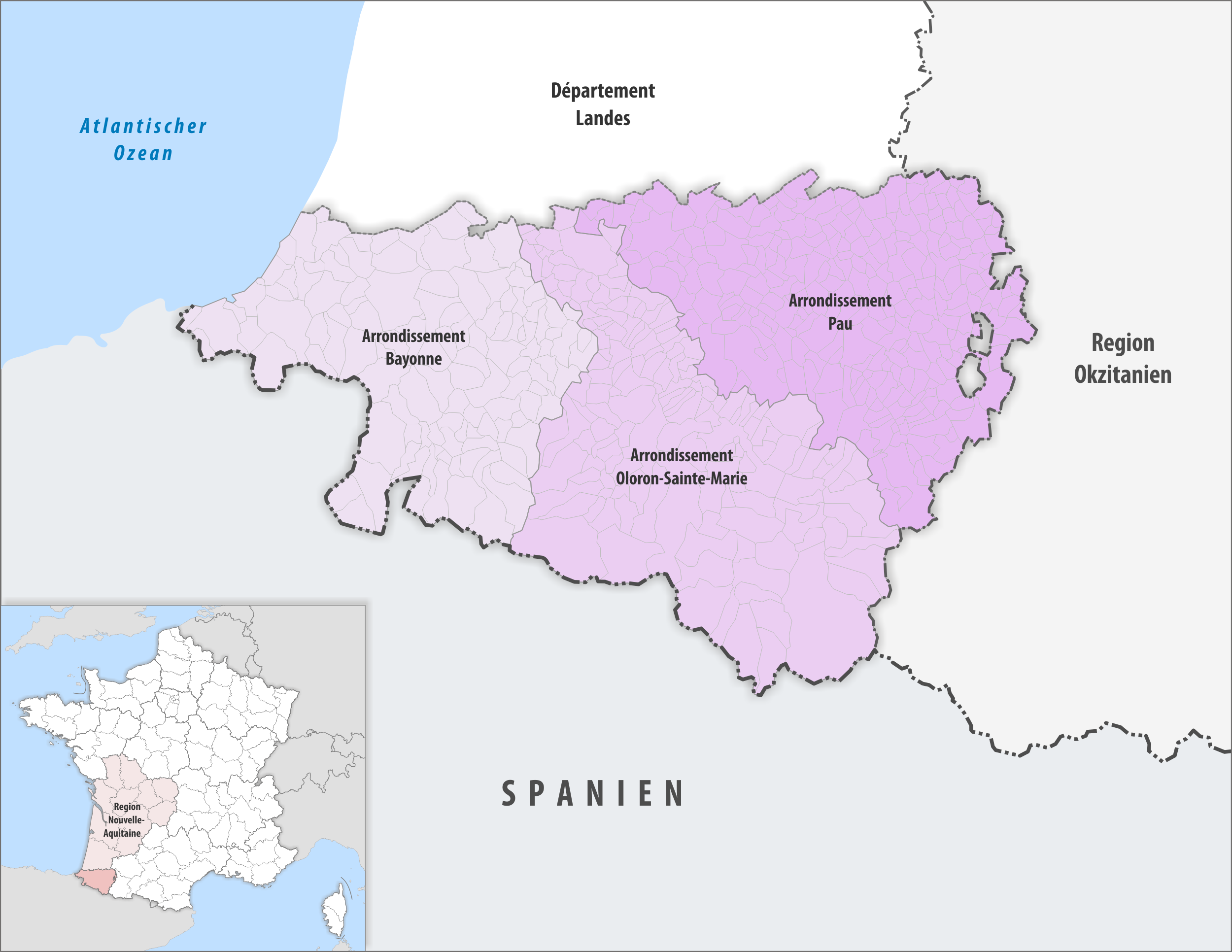 Gemeinden und Arrondissemente im Departement Pyrénées-Atlantiques